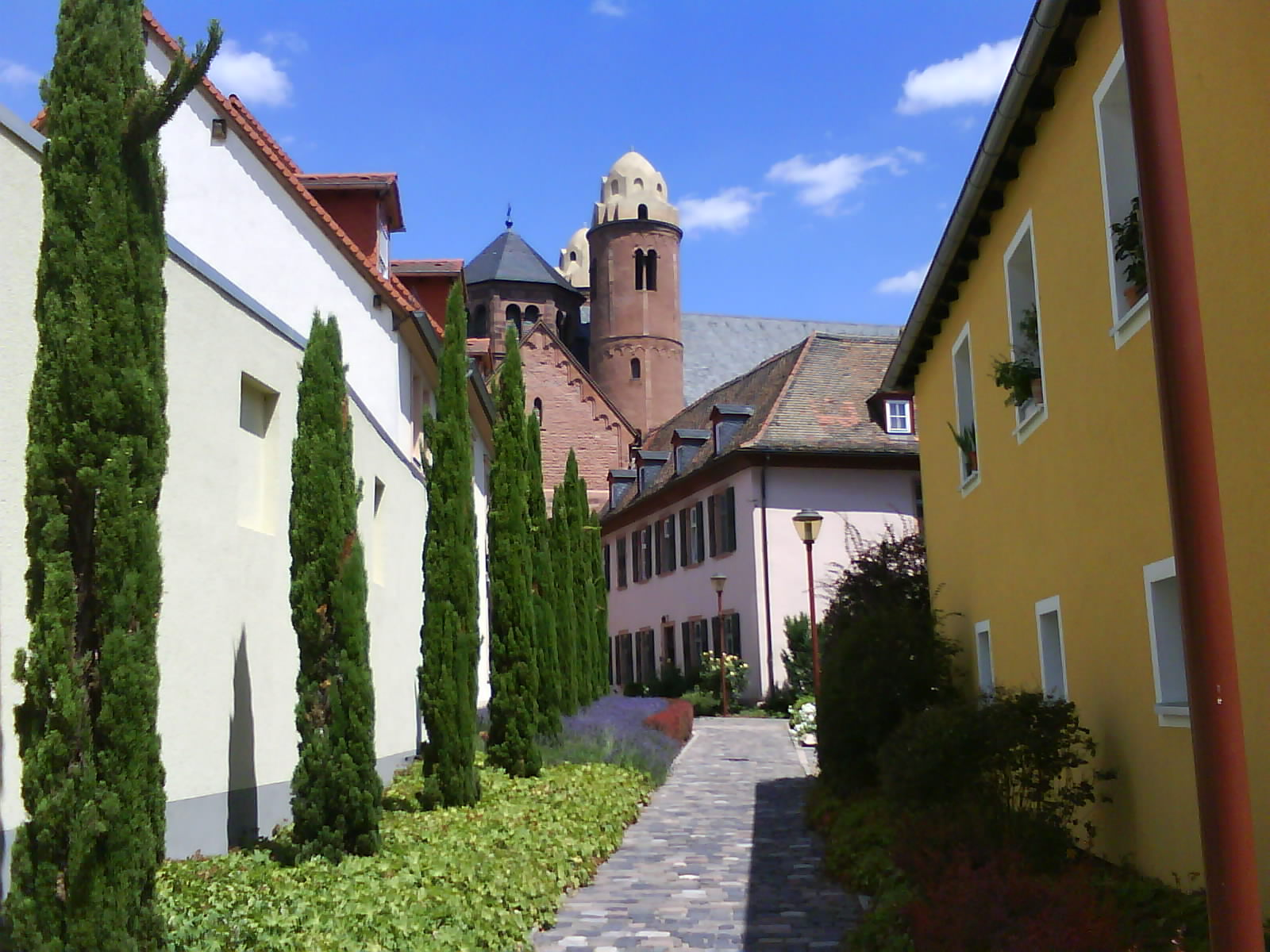 Церковь св. Павла, Вормс, Германия